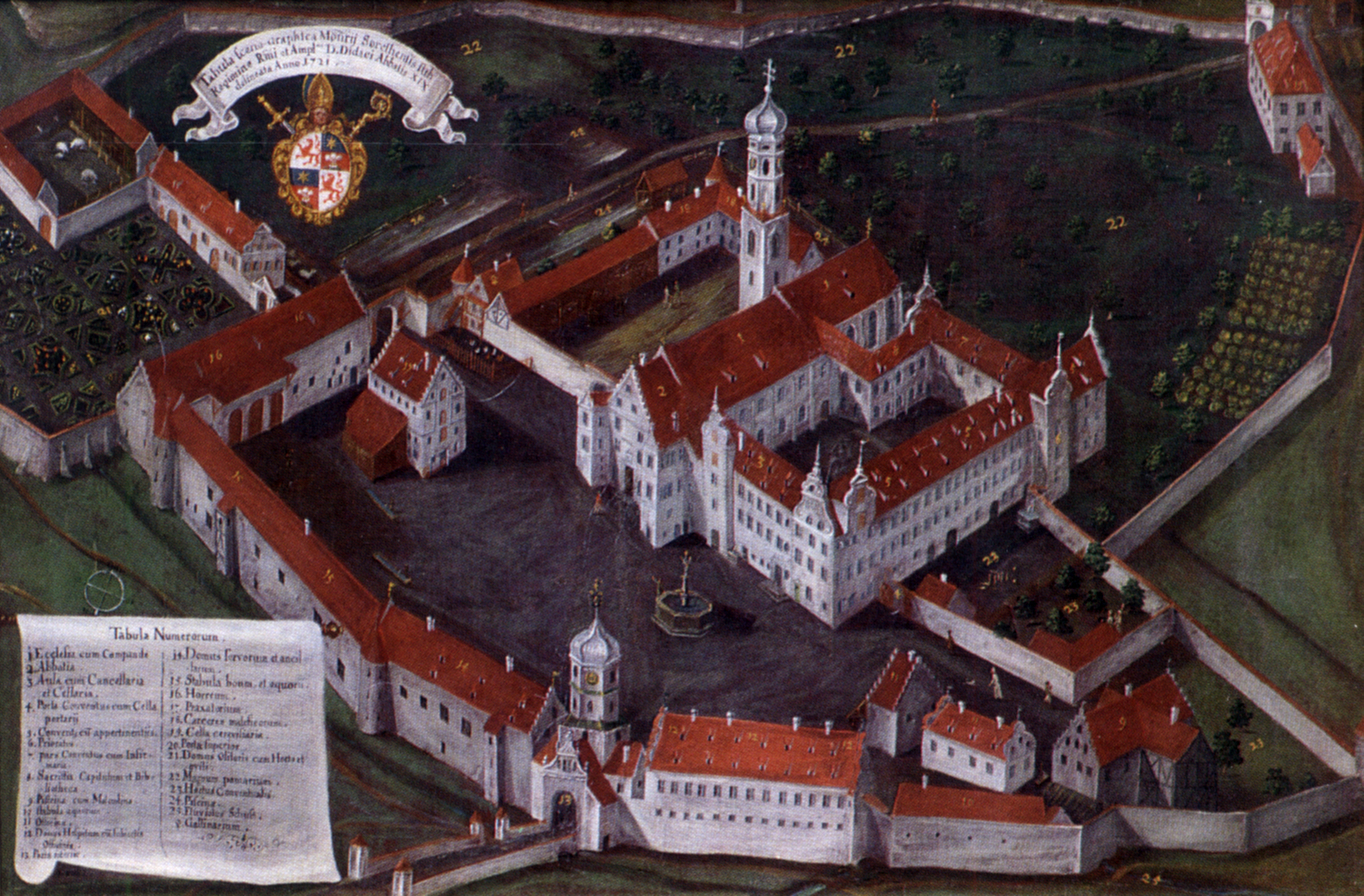 Kloster Schussenried, Ansicht von 1721 mit dem Wappen des Abts Didacus Ströbele